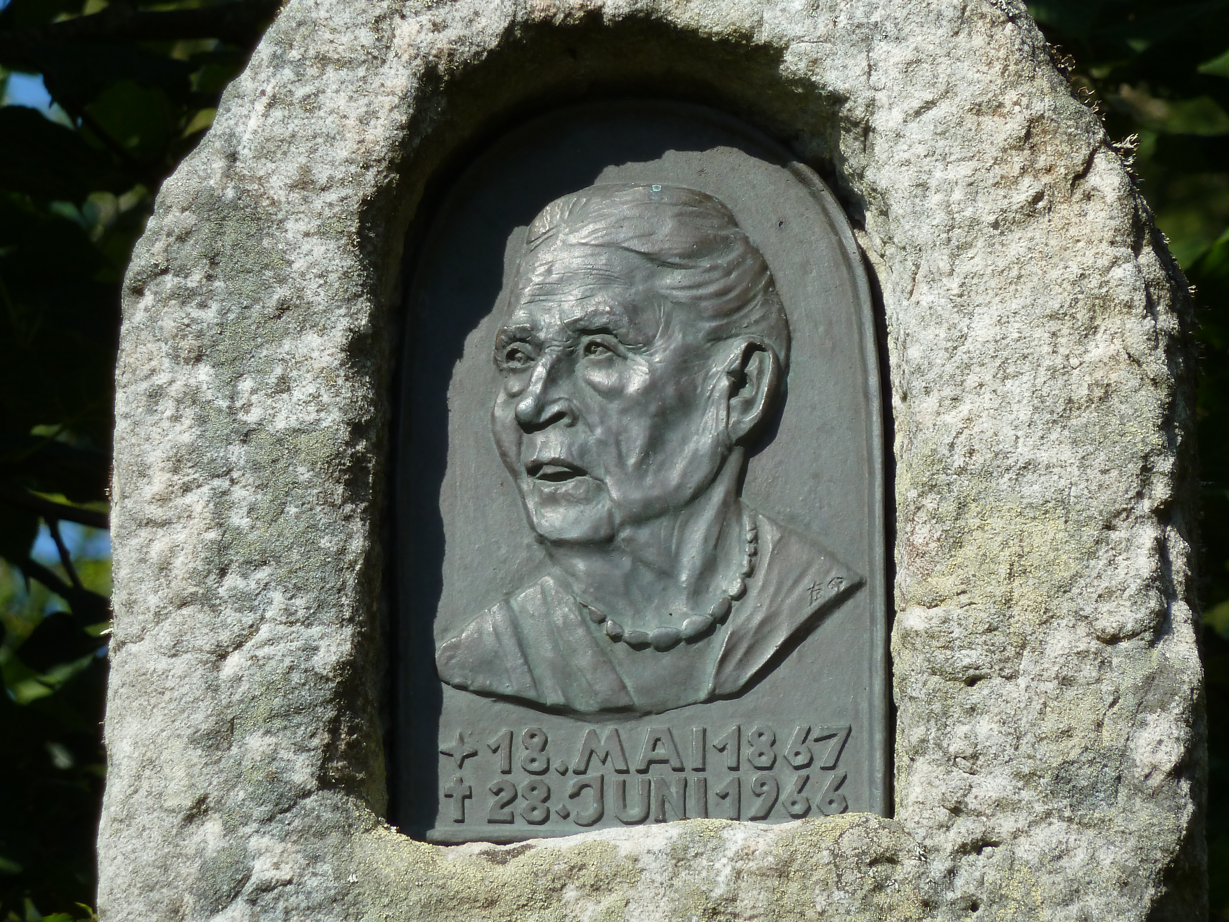 Gedenktafel für Helene Siegfried-Aichele am Heimatmuseum Hüsli in Grafenhausen-Rothaus